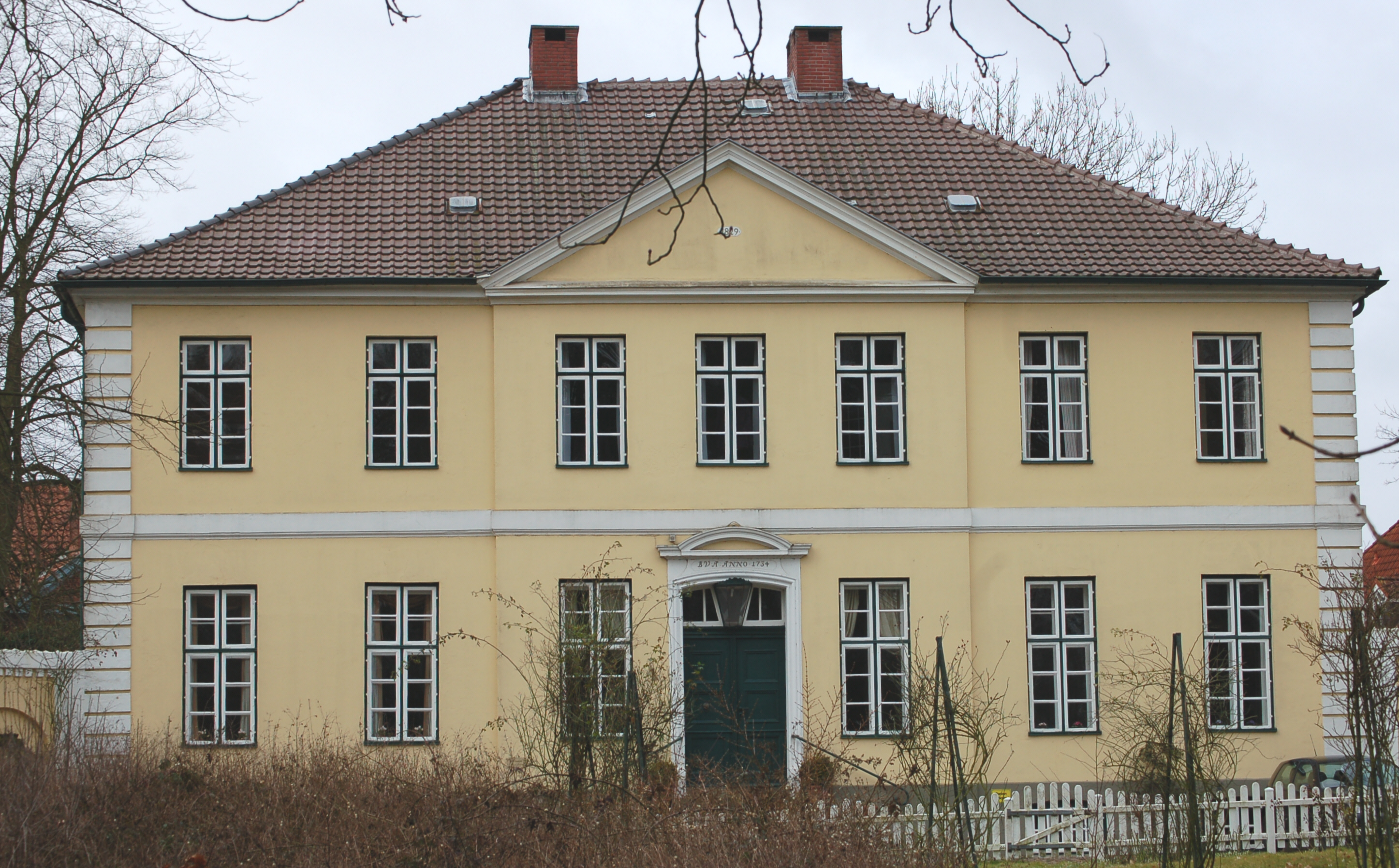 Kloster, Haus des Klosterpropstes in Uetersen aus dem Jahr 1734